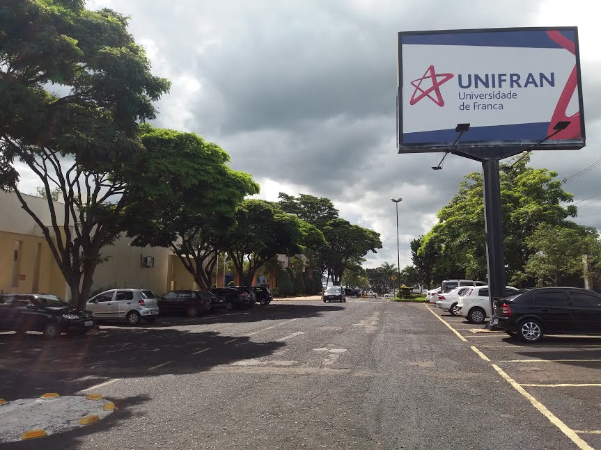 Universidade de Franca (SP), Brasil